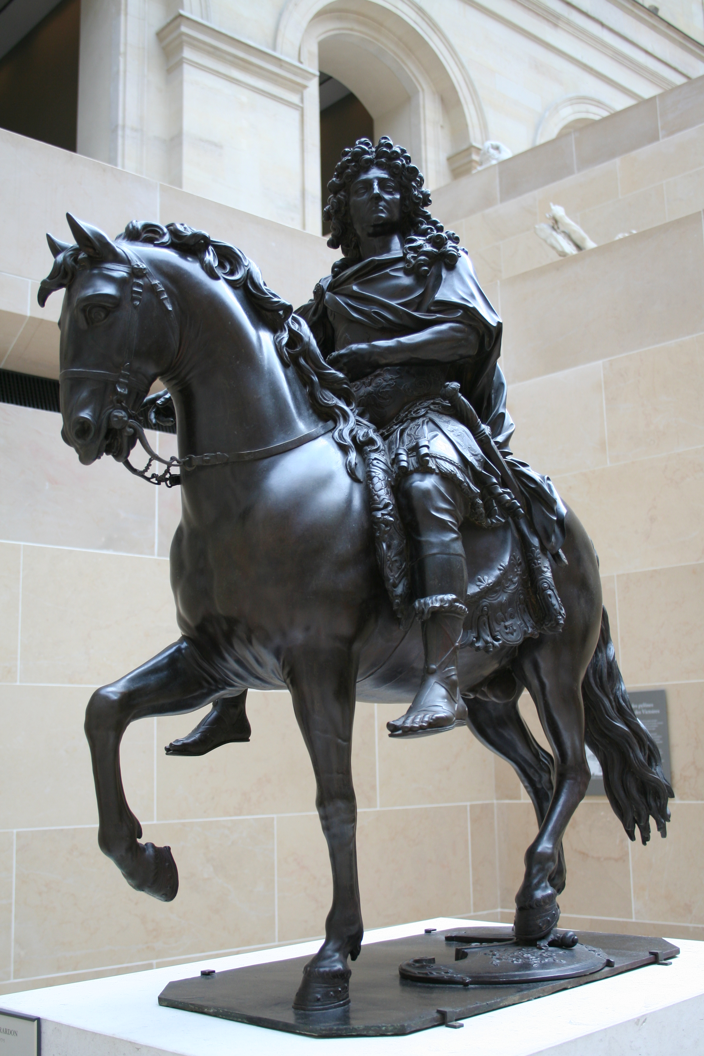 Louis XIV Réduction de la statue équestre exécutée en 1692 et dressée en 1699 sur la place Vendôme , à Paris. Acquis par l'administration royale en 1784 et placé dans la salle des Antiques du Louvre. Sculpteur : François Girardon (Troyes, 1628 - Paris, 1715) Saisie des collections royales